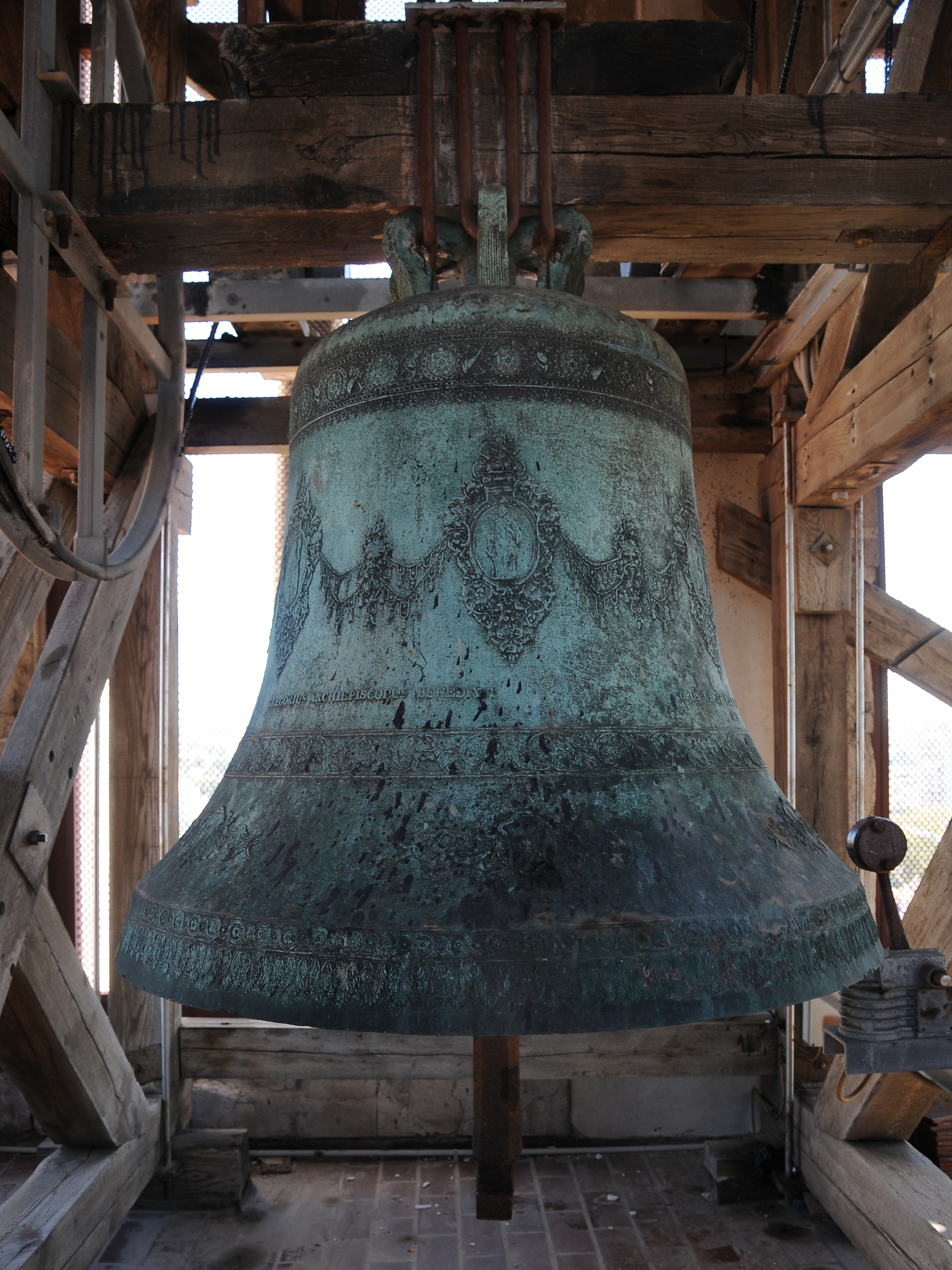 Im Kirchturm der Kathedrale St. Anastasia in Zadar.